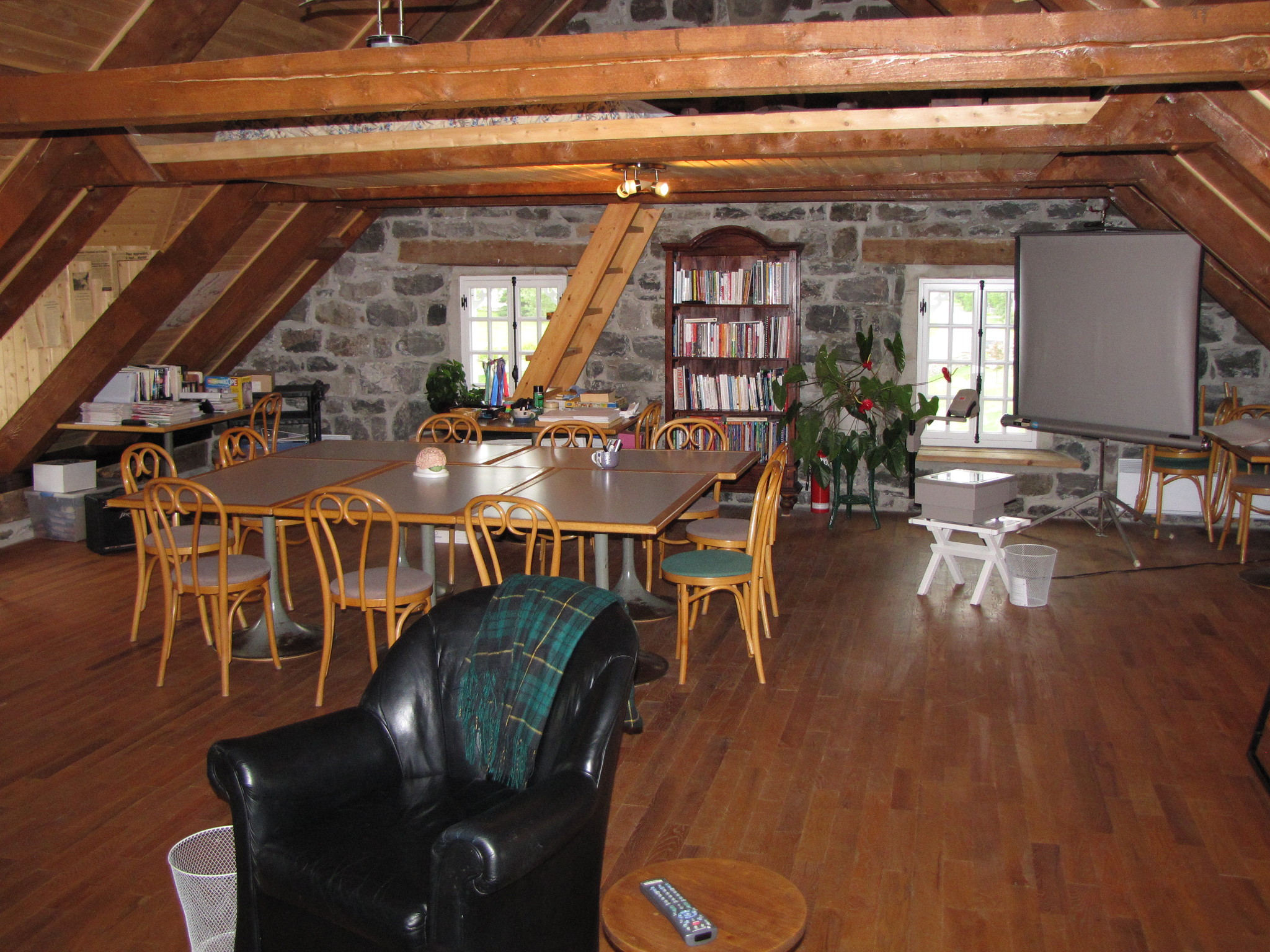 Intérieur du Moulin banal du ruisseau à la Loutre, situé à Sainte-Luce (Bas-Saint-Laurent, Québec). Tous les mécanismes ont été défaits pour y aménager une résidence. Actuellement, il sert de centre de formation et de gîte touristique. Moulin à eau; moulin à farine.